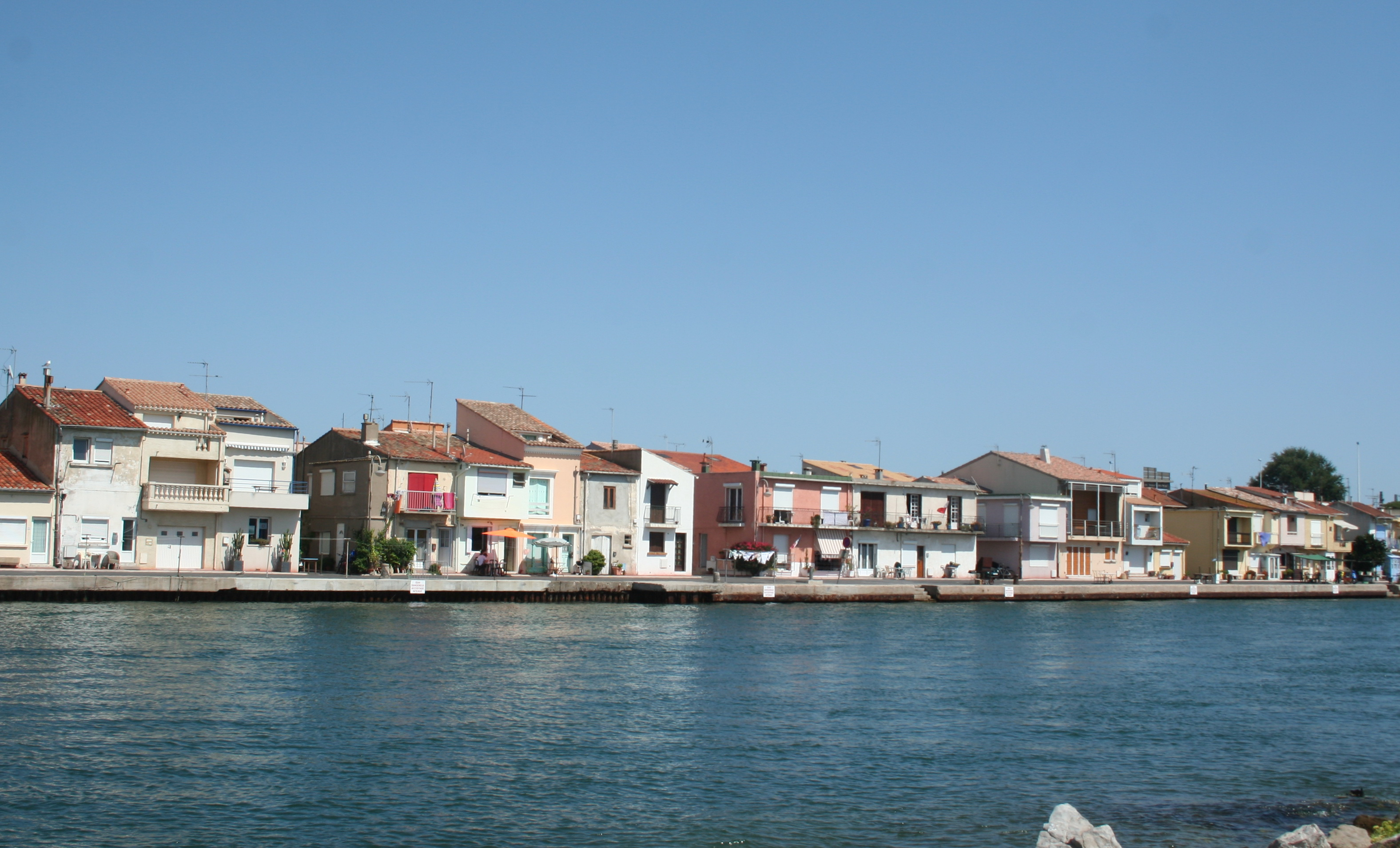 Sète (Hérault) - Pointe Courte.